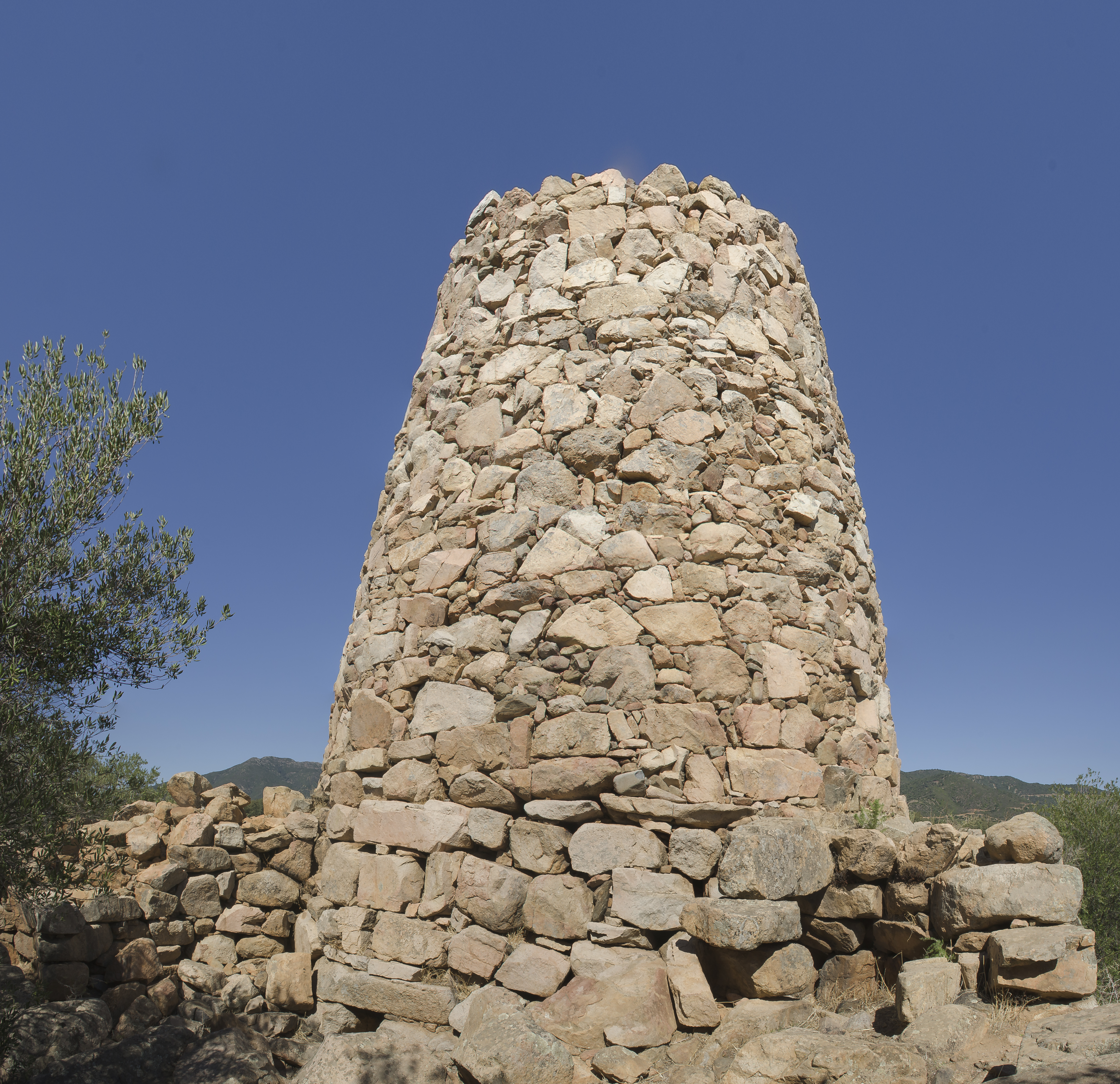 Nuraghe Asoru, Sardinien. NOTE: This image is a panorama consisting of 12 frames that were merged in Hugin. As a result, this image necessarily underwent some form of digital manipulation. These manipulations may include blending, blurring, cloning, and color and perspective adjustments. As a result of these adjustments, the image content may be slightly different than reality at the points where multiple images were combined. This manipulation is often required due to lens, perspective, and parallax distortions. This image was created with Hugin